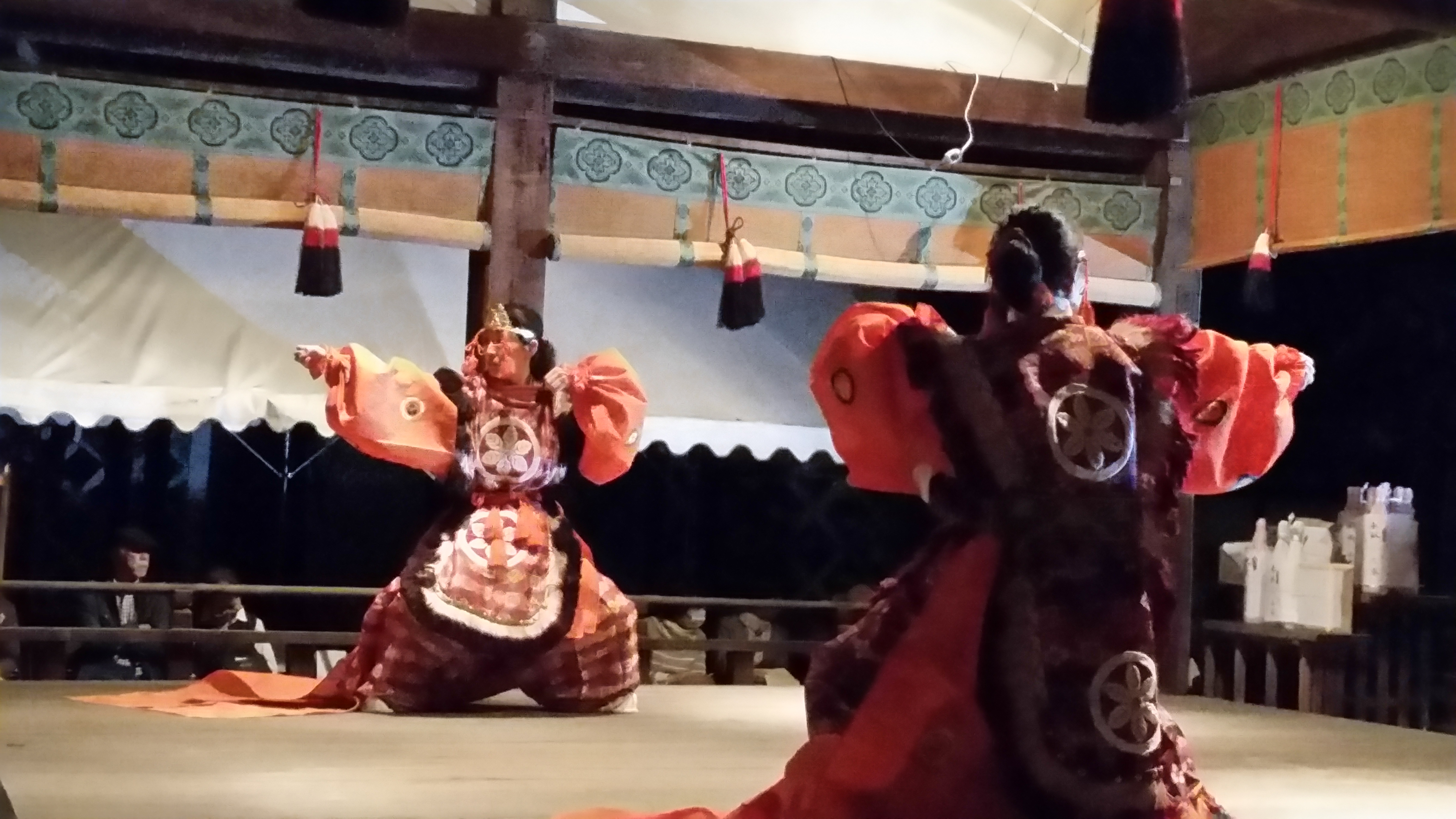 氷室神社例祭、夕座の風景、舞楽「抜頭」、奈良